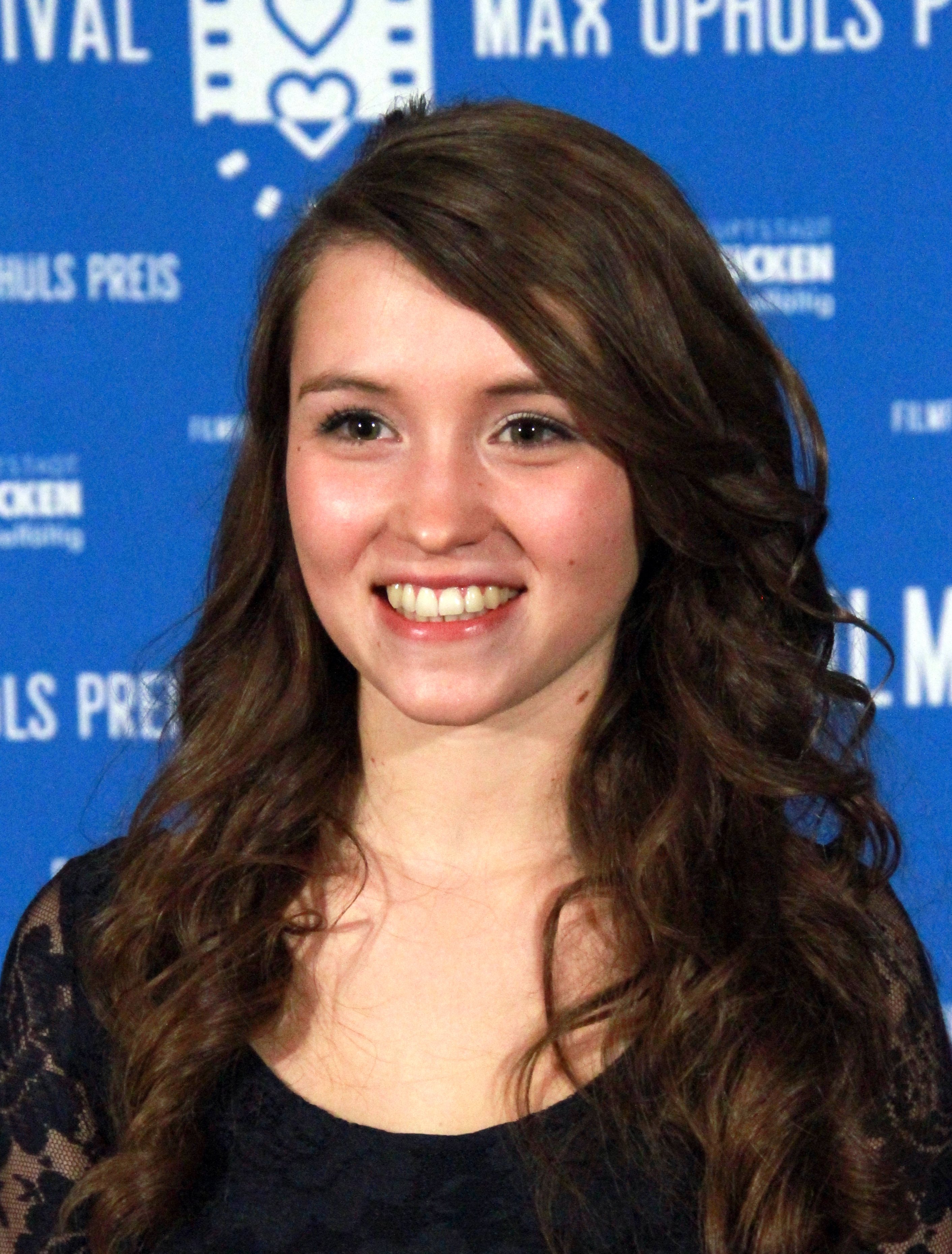 Janina Fautz auf dem Max-Ophüls-Filmfestival 2015